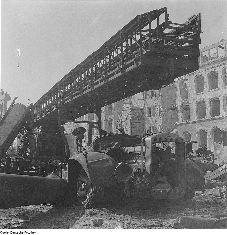 Original image description from the Deutsche Fotothek Feuerwehrfahrzeug mit Drehleiter in Fahrstellung, auf dem Weg zum Einsatz zerstört und ausgebrannt